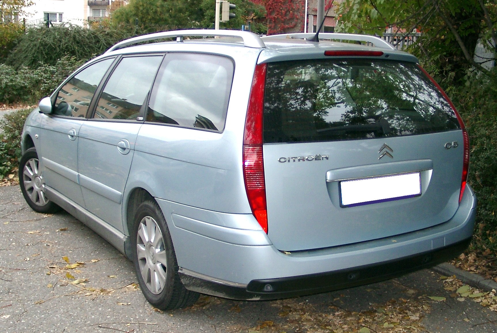 Citroen C5